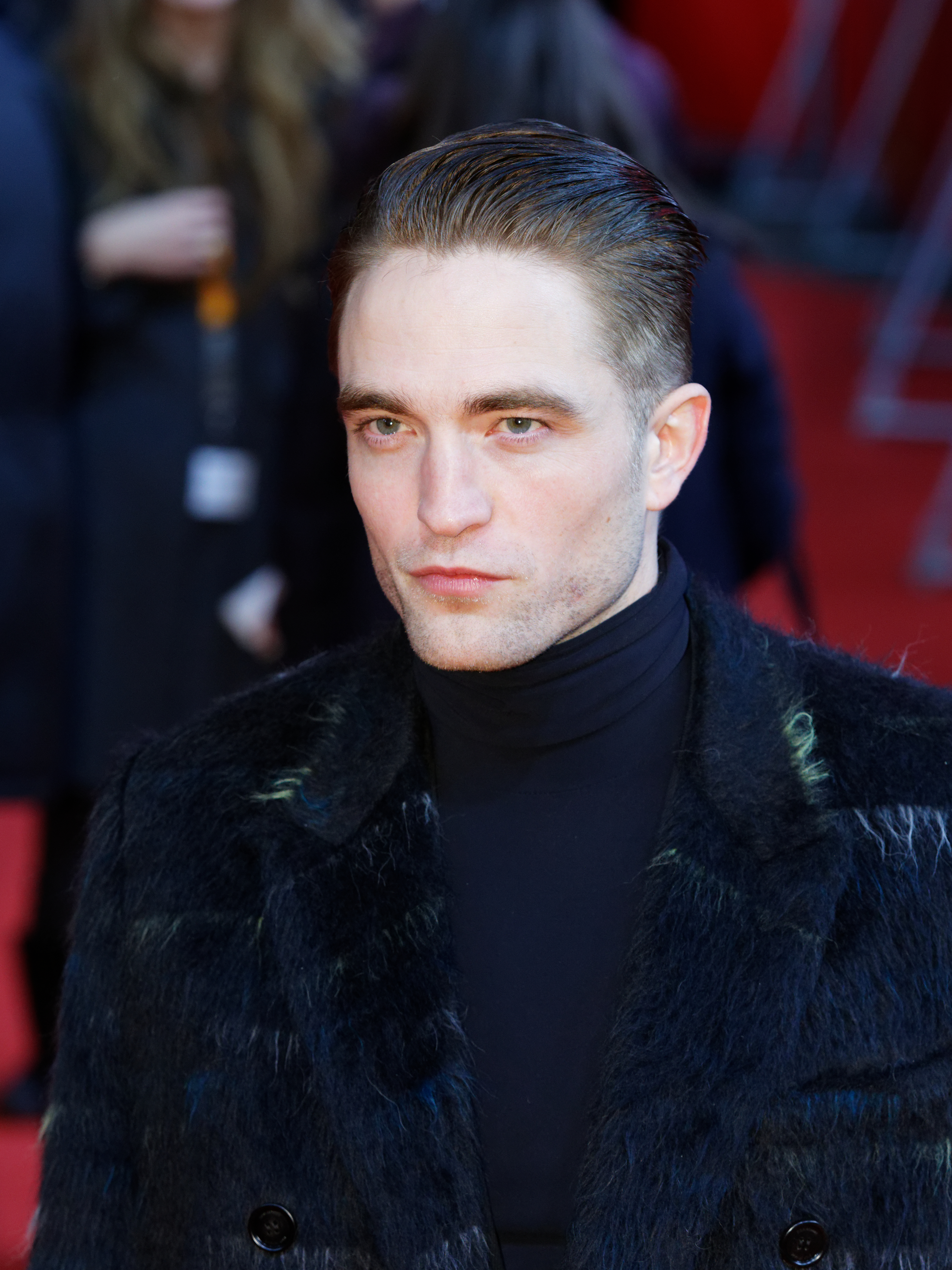 Robert Pattinson bei der Premiere von Die versunkene Stadt Z im Zoo Palast bei der Berlinale 2017